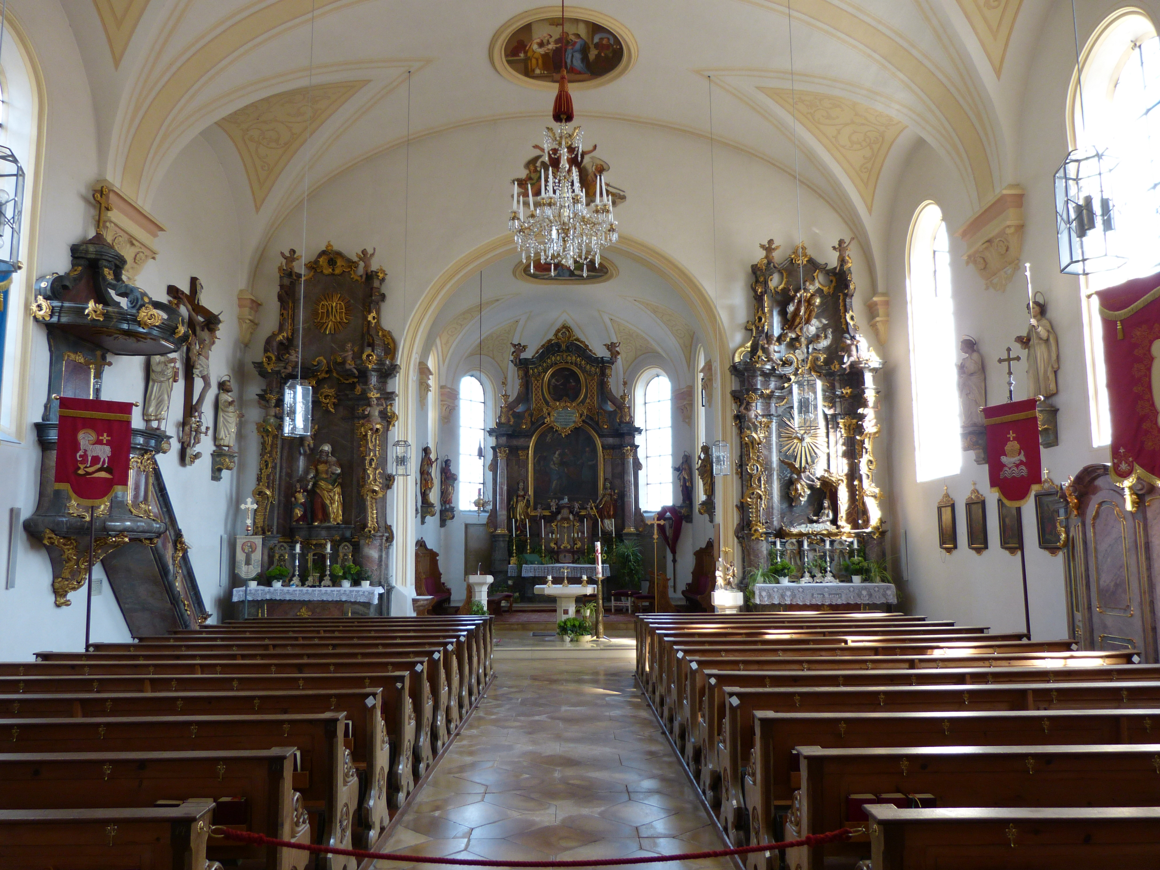 Mariä Heimsuchung in Amberg, Landkreis Unterallgäu, BayernThis is a photograph of an architectural monument.